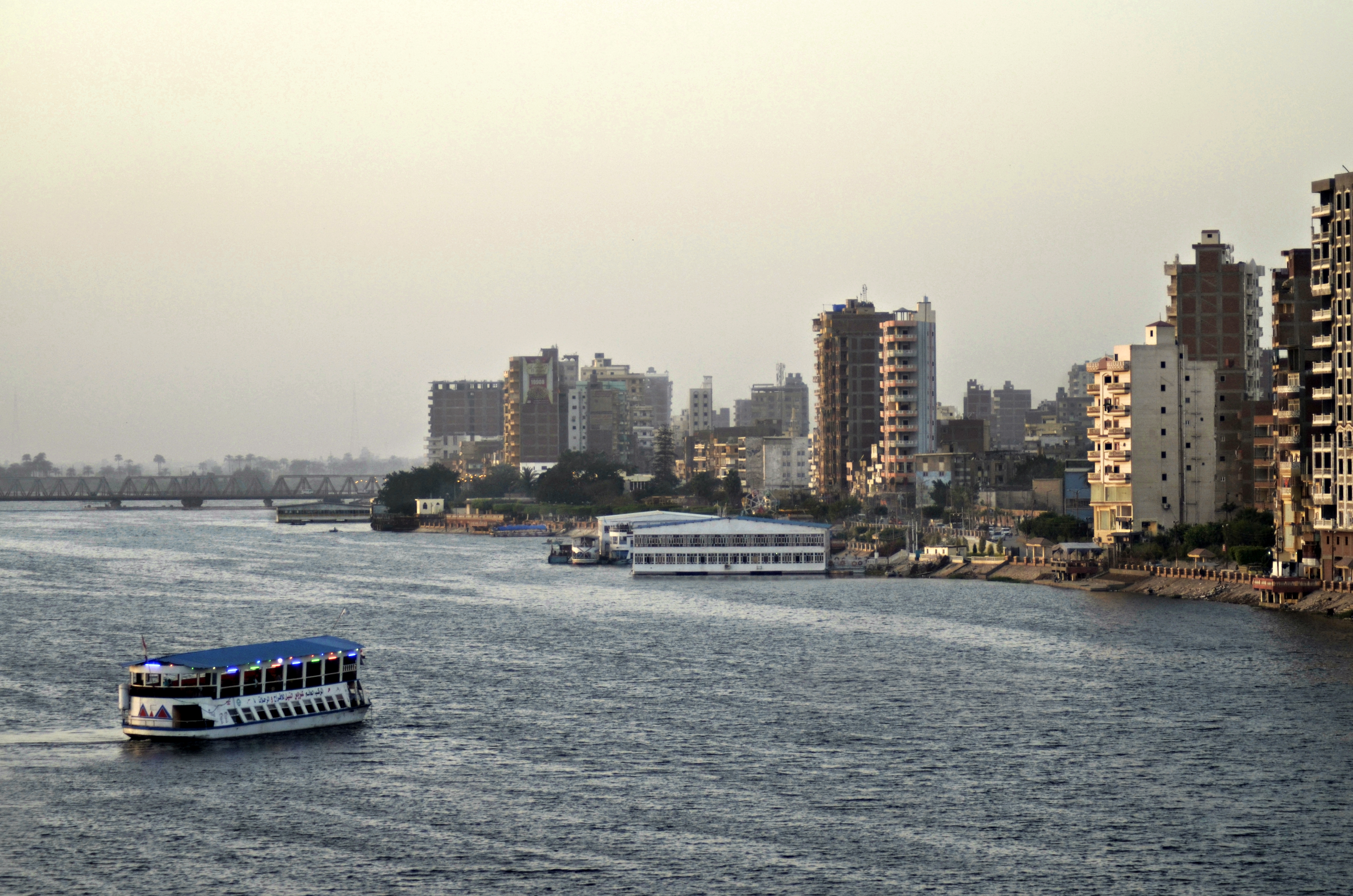 جزء من حي جنوب دسوق على النيل وقت الغروب، مصر.